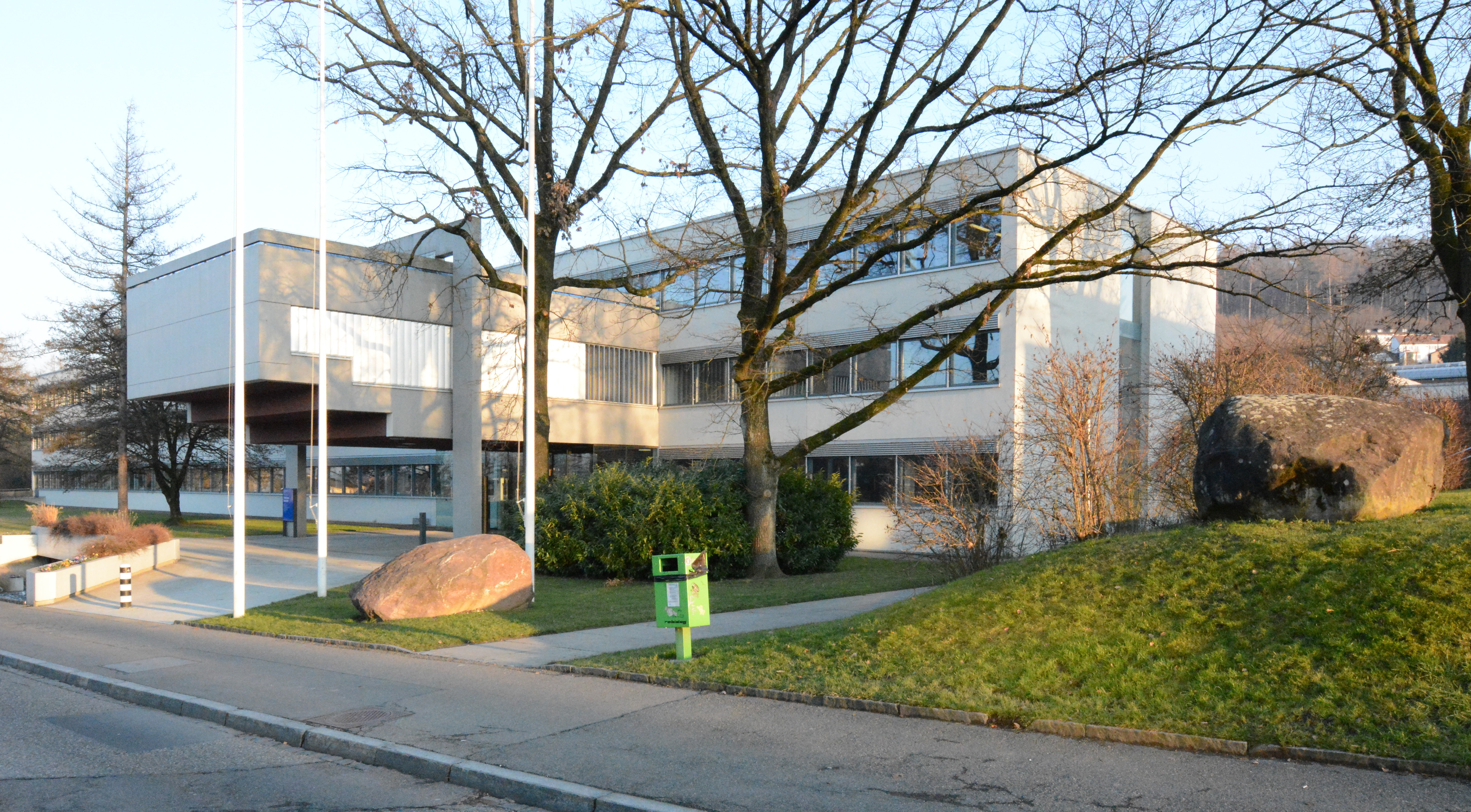 Tierspital Zürich, Hauptfassade mit Hörsaal, 1947. Architekt: Werner Stücheli